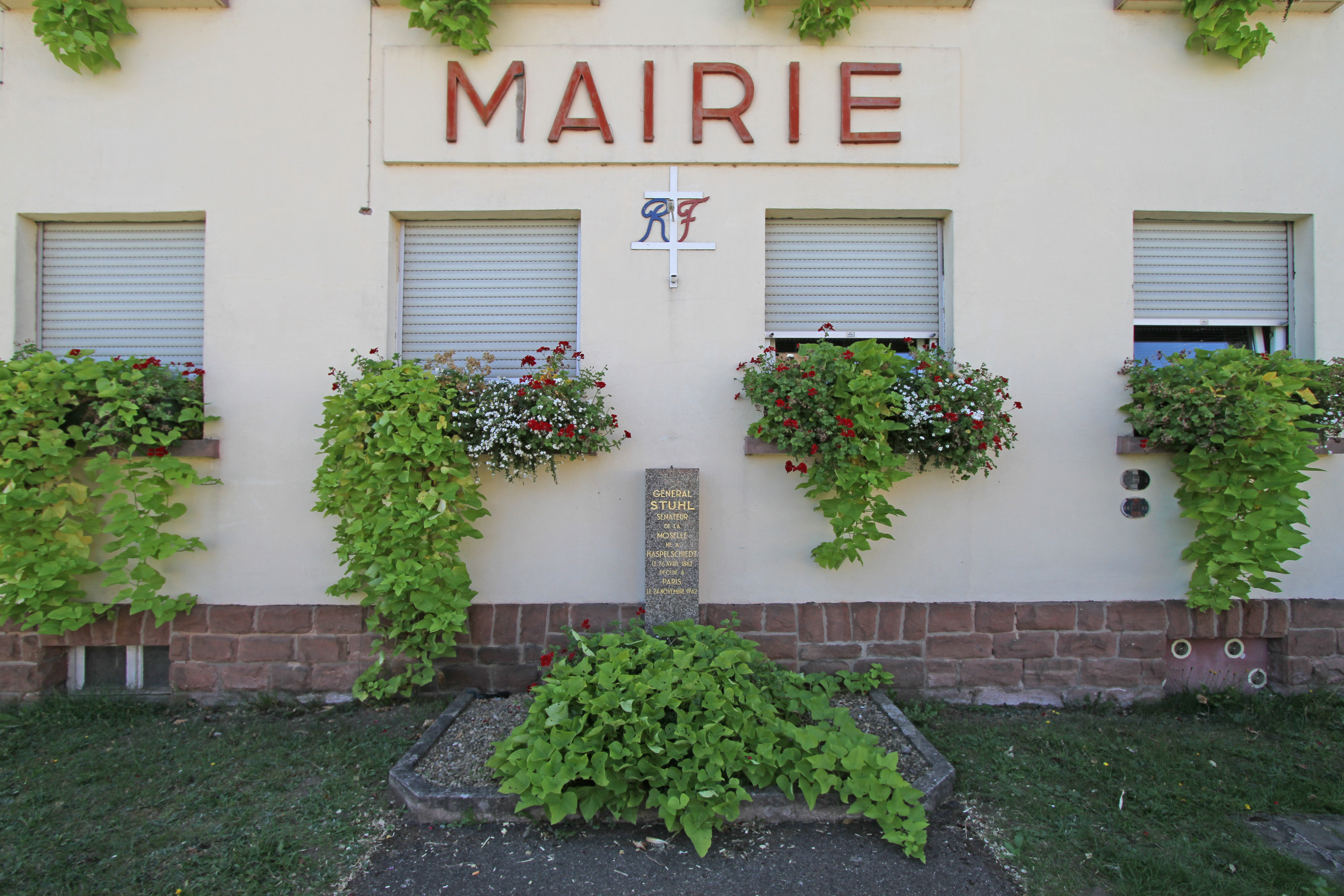 Haspelschiedt